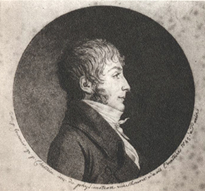 Fredrik Wilhelm Carpelan (1778-1829)